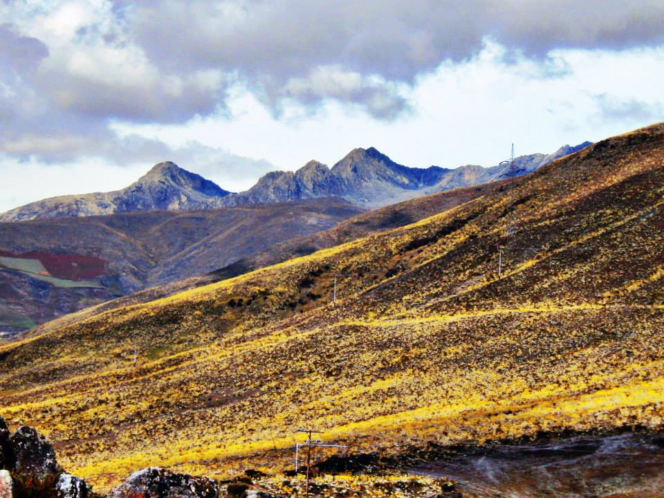 Vista del páramo de Mucubají y al fondo Sierra de La Culata (Edo. Mérida)